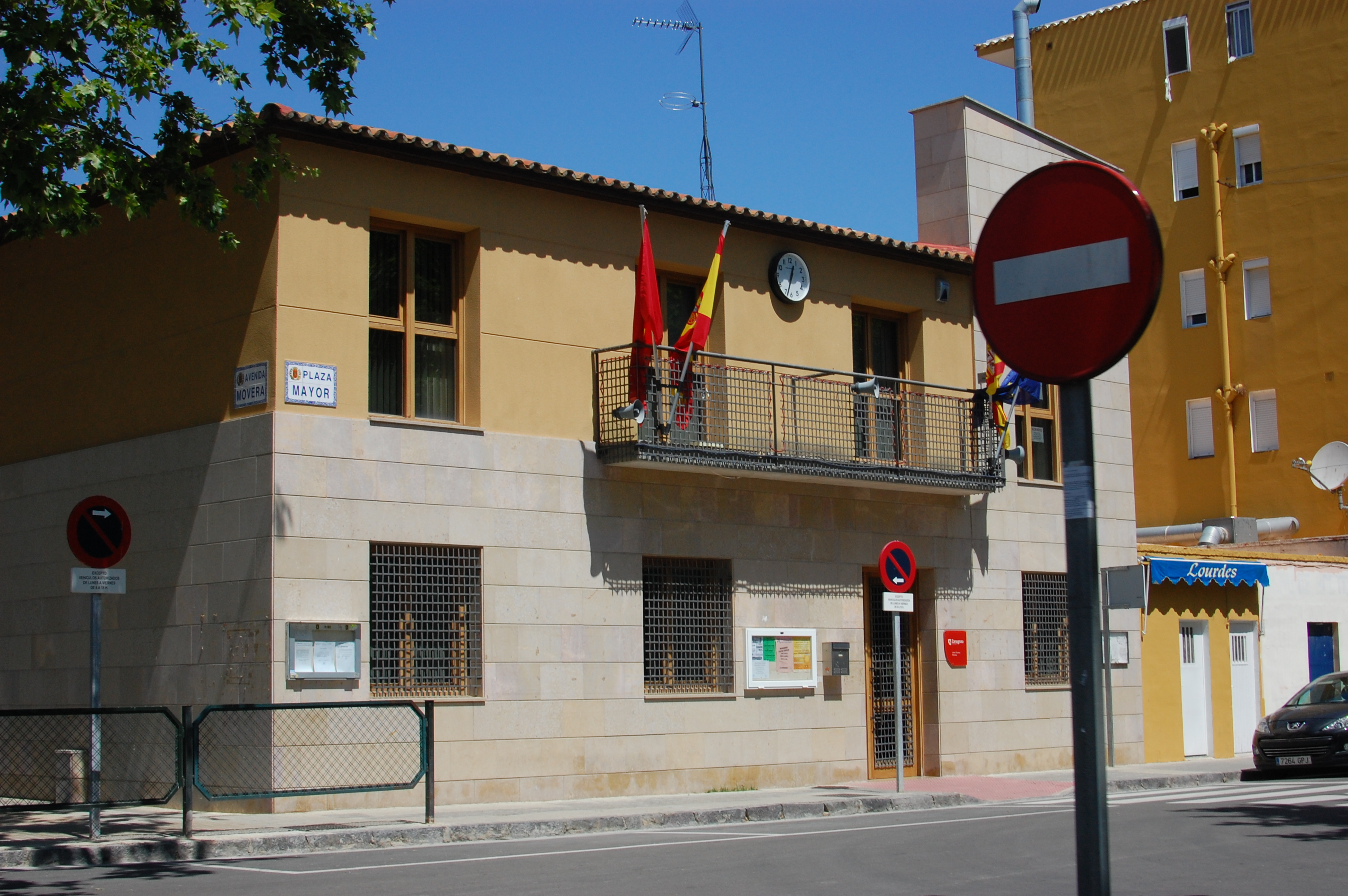 Aragonés: Casa d'o lugar de Movera